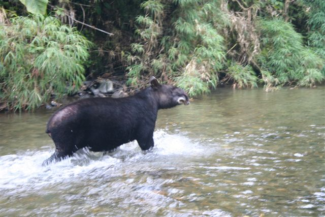 Tapir de Montaña Tapirus pinchaque (Sierrazul-Ecuador)